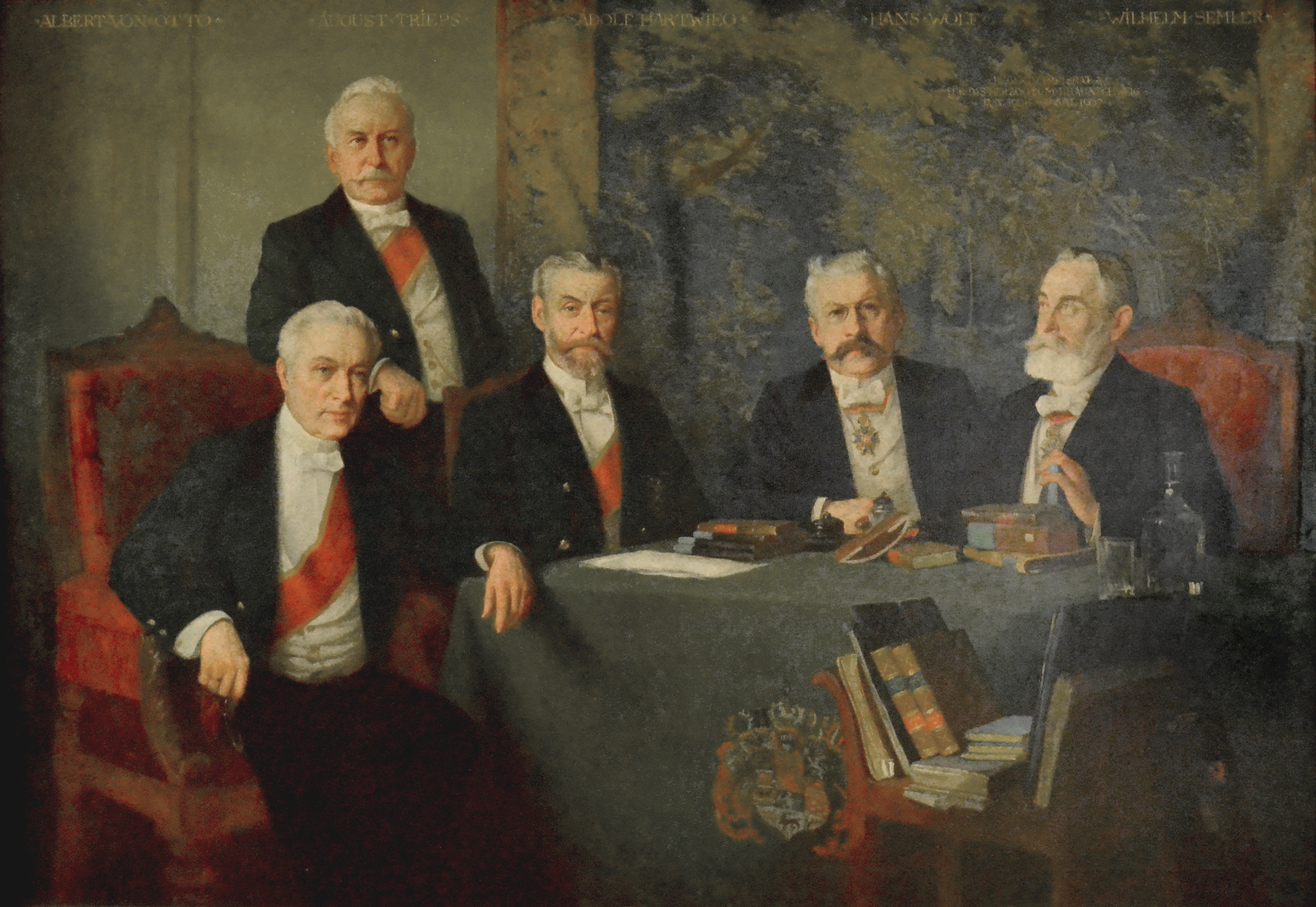 Braunschweig, Regentschaftsrat: Gemälde von Fritz Moritz Röbbecke aus dem Jahre 1909. Abgebildet die Mitglieder der Zusammenkunft des Regentschaftsrates vom 13. September 1906 bis 5. Juni 1907 (v.l.n.r.): Albert von Otto, Adolph Trieps, Adolph Hartwieg, Hans Wolf und Wilhelm Semler.